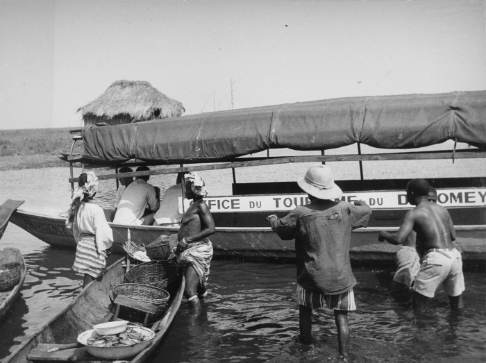 Ganvié is midden in een zoutwatermeer gebouwd en ligt aan de zuidkust van Benin. Het paalwoningendorp werd gebouwd als reactie op de aanvallen van Fon krijgers op naburige gemeenschappen in de 16e eeuw. De Dan-Homey koning probeerde via de slavenhandel zijn rijkdom te vergroten en liet zijn krijgers het achterland uitkammen op zoek naar slaven. Water vormde echter een serieus obstakel voor de krijgers, zij waren gebonden aan traditionele wetten waarin het betreden van water 'taboe' was. Vluchtelingen besloten daarop hen voortaan uit de weg te gaan door een dorp midden in de lagune te bouwen, en met succes. Zo ontstond het volk van de Tofinu, 'mensen gedragen door het water'. De bescherming van het water heeft er toe bijgedragen dat de bevolking tegenwoordig enkele tienduizenden zielen telt. In het dorp wordt alles via het water gedaan. Er zijn nauwelijks bruggen en kleine bootjes ('pirogues') varen af en aan tussen de huizen.